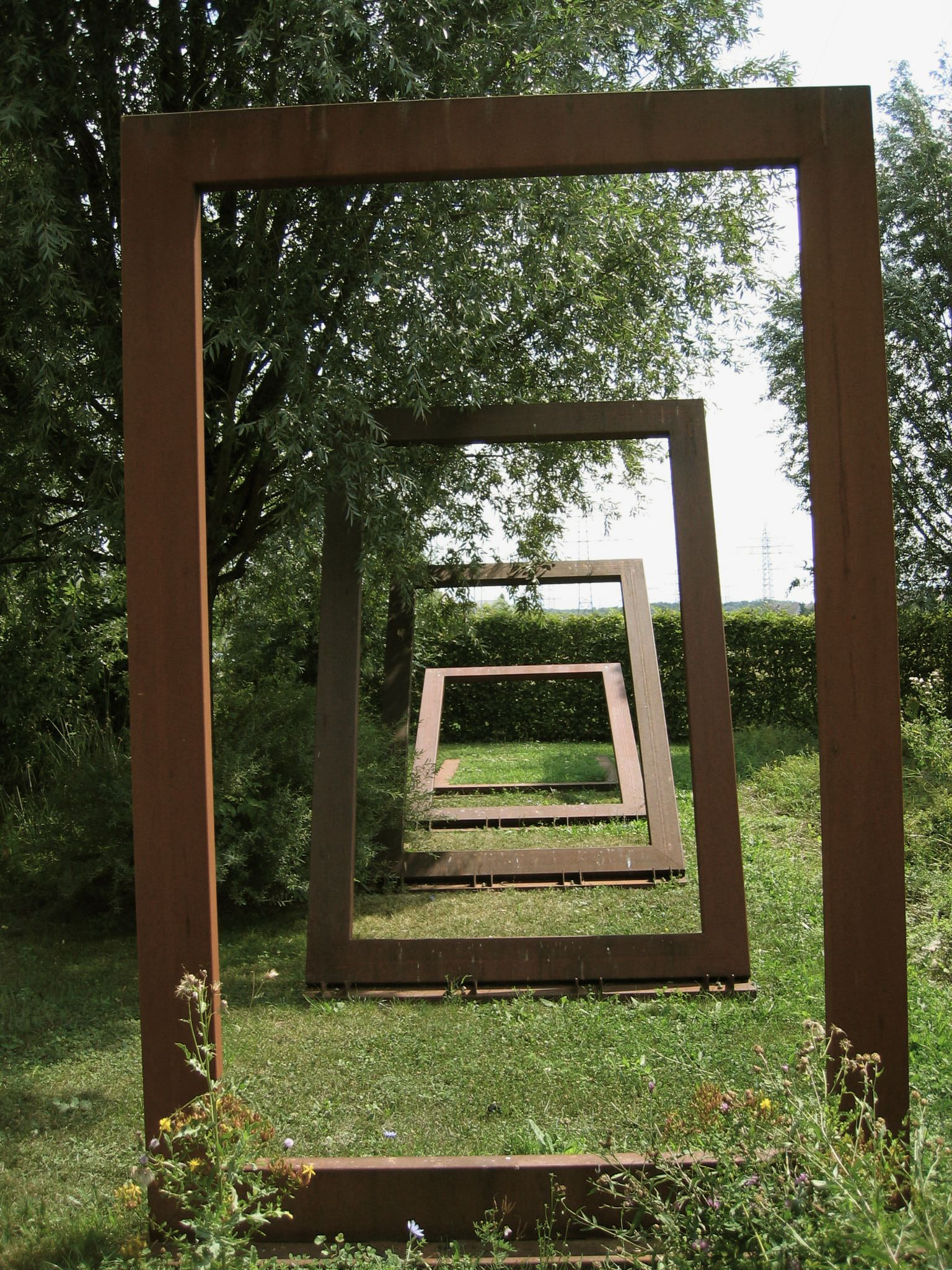 sculpture Fallender Rahmen by Kurt Fleckenstein in Mannheim/Germany